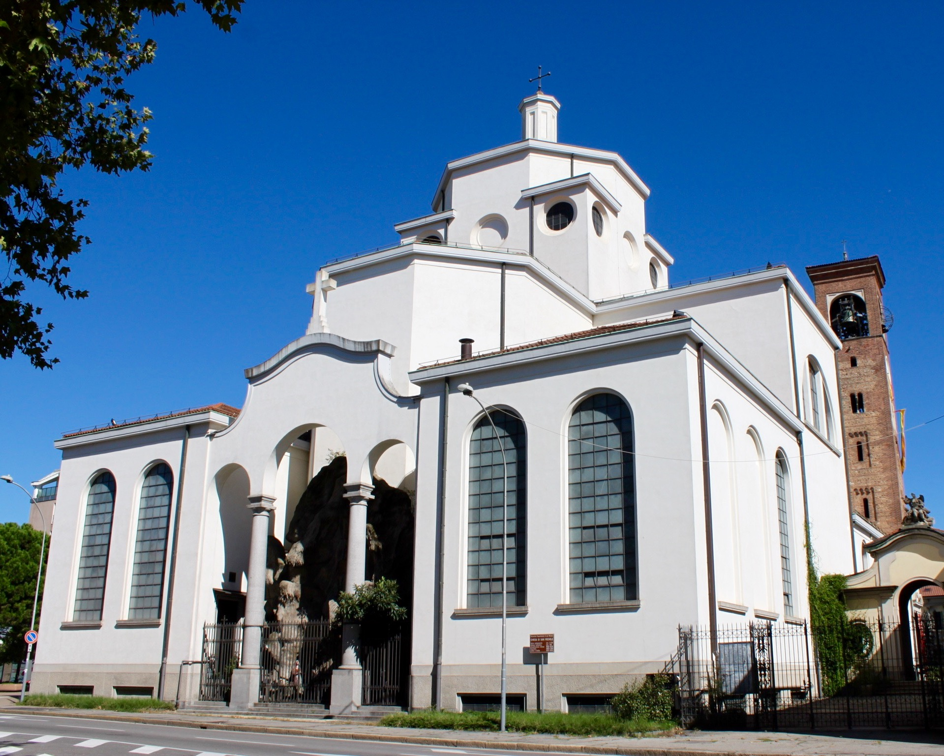 Facciata lato ovest This is a photo of a monument which is part of cultural heritage of Italy.